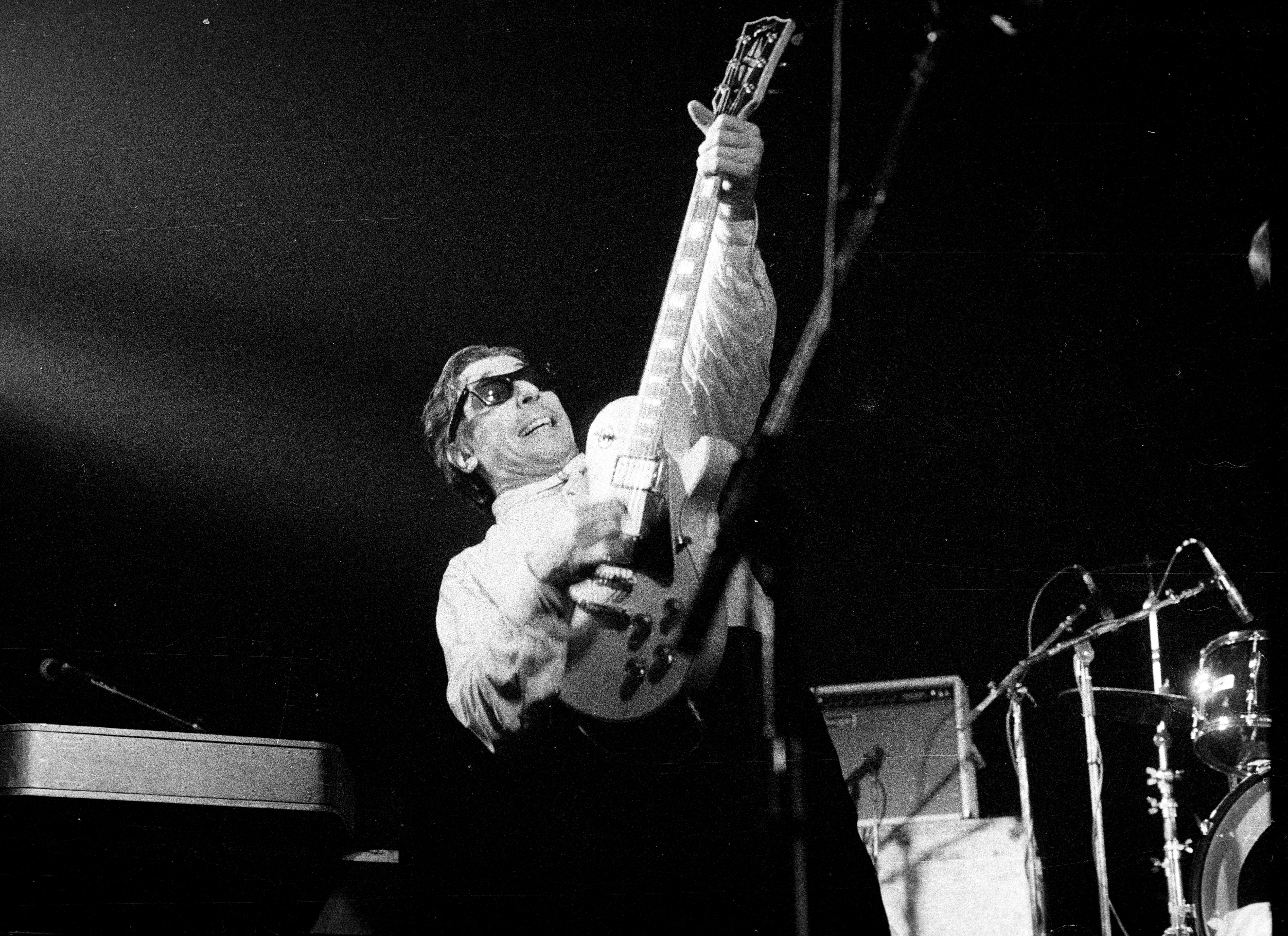 Vooruit - Ghent - 1983